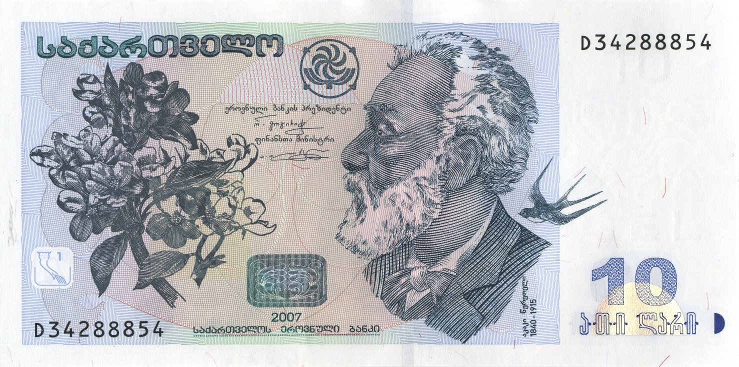 10 Georgian lari